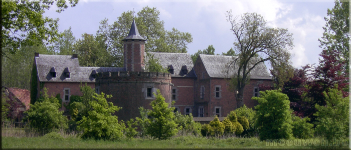 Kasteel Meeuwen-Gruitrode